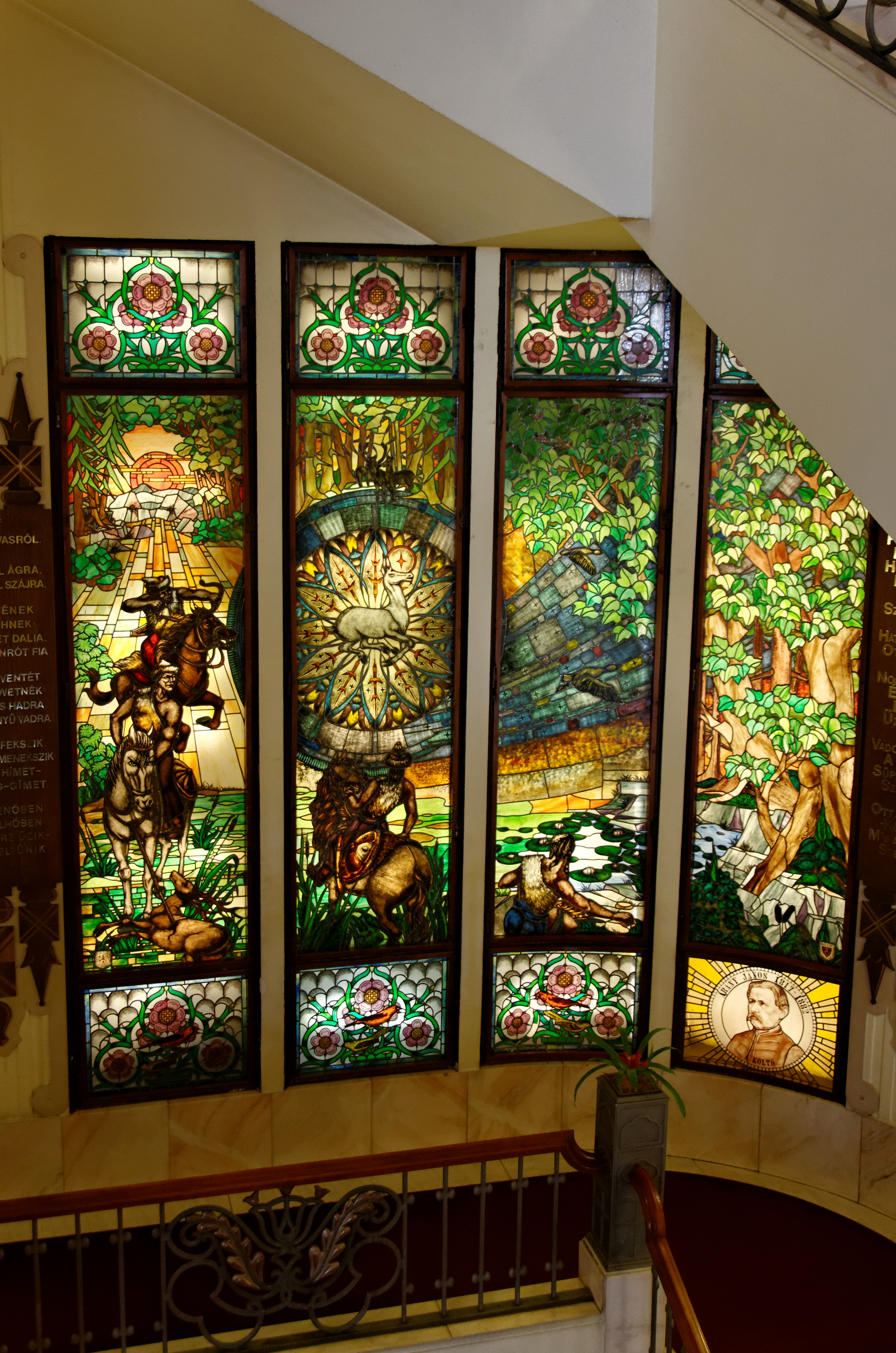 Vitraux de Bózó Stanisits, hôtel Gellért (Budapest). Ajoutés en 1933, ils éclairent les paliers de l'escalier principal et illustrent la légende hongroise du Cerf magique rapportée par le poète János Arany